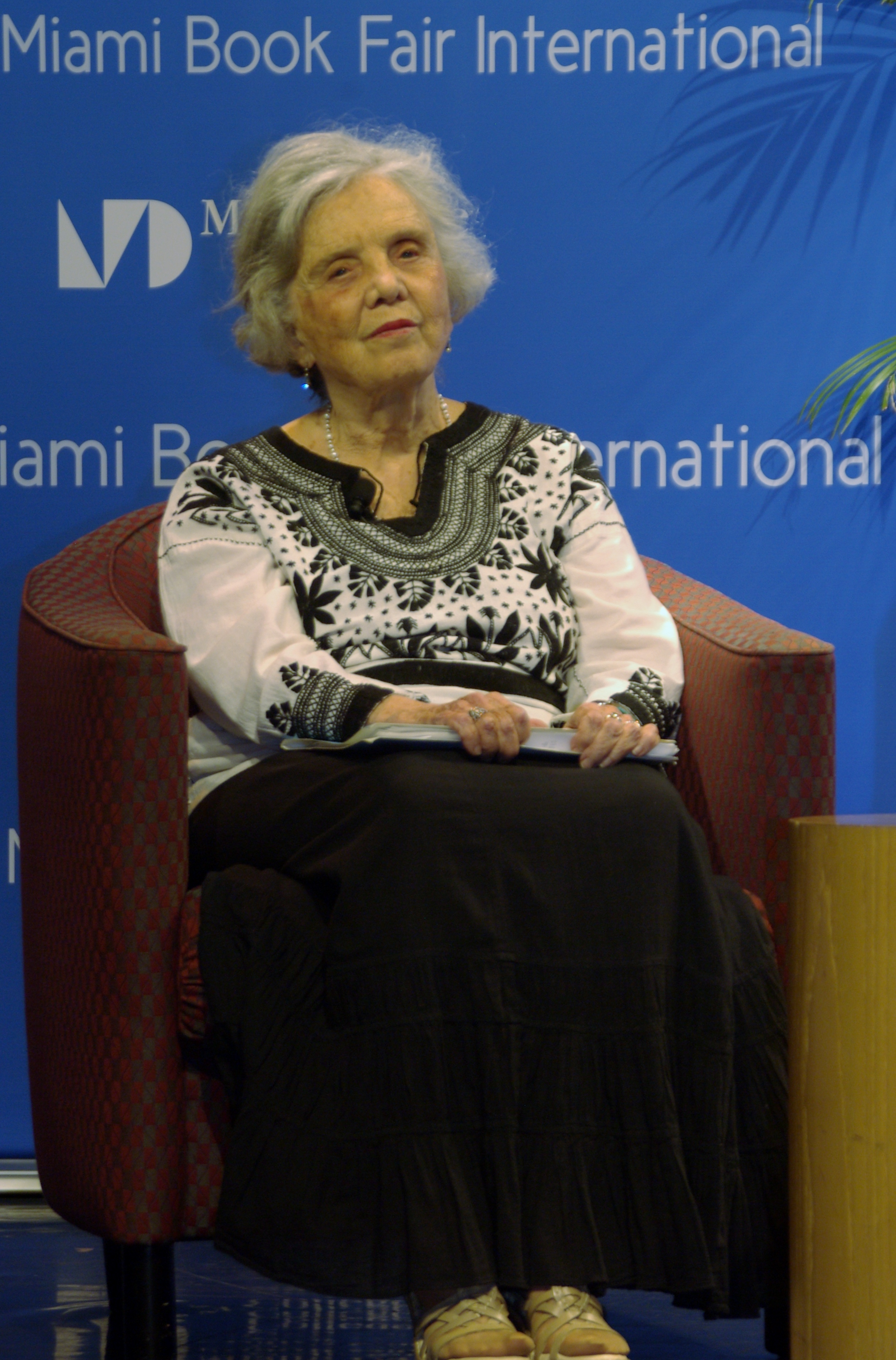 La escritora mexicana Elena Poniatowska en la Feria Internacional del Libro de Miami, 2014